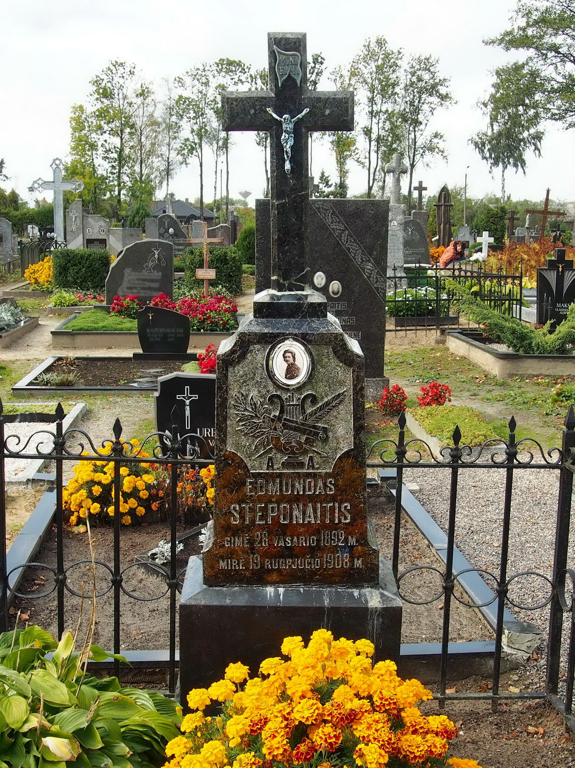 Poeto Edmundo Steponaičio antkapinis paminklas Šakių miesto kapinėse (pagamintas Teodoro Martusevičiaus dirbtuvėje, Kaune)